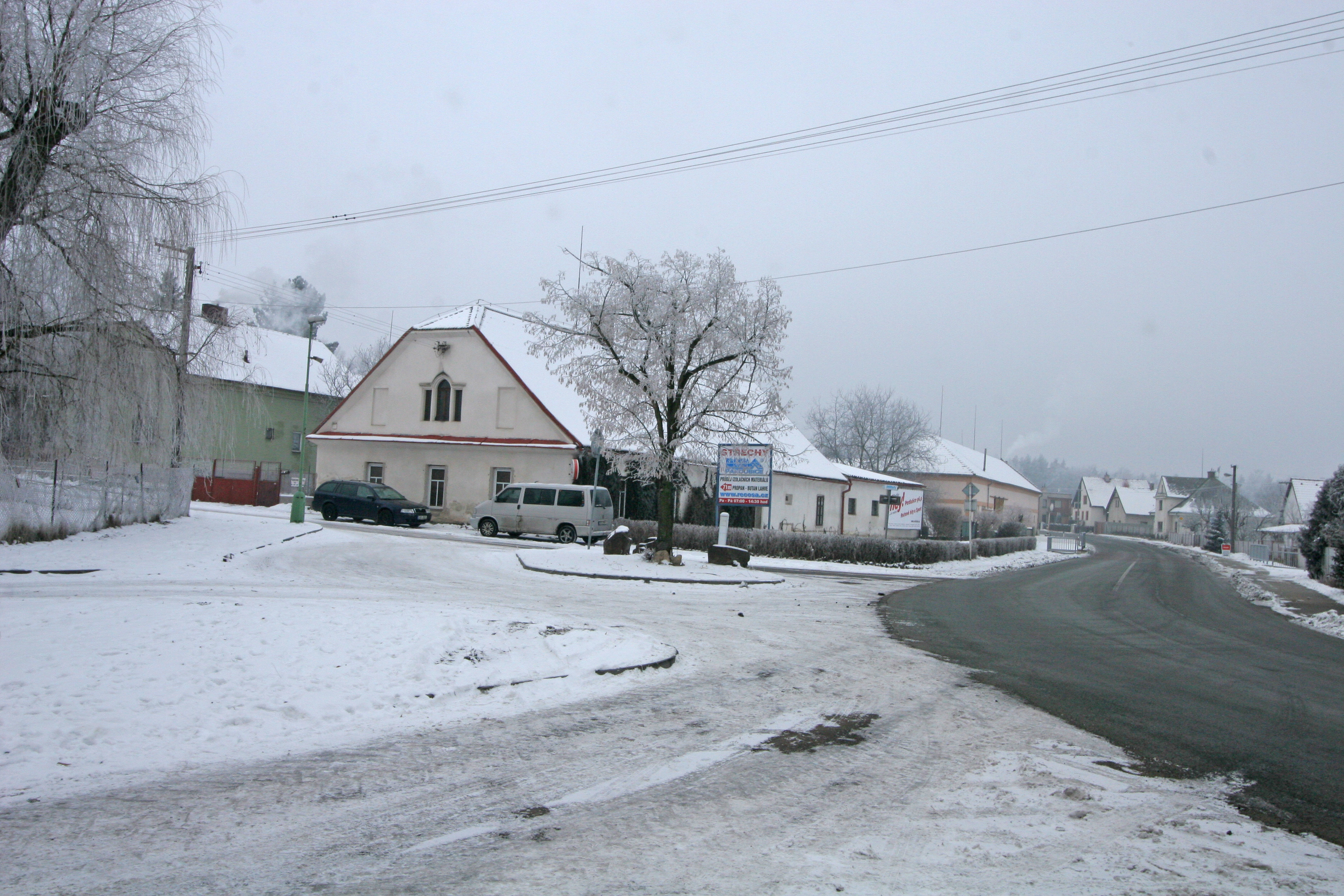 Zminný čp. 7